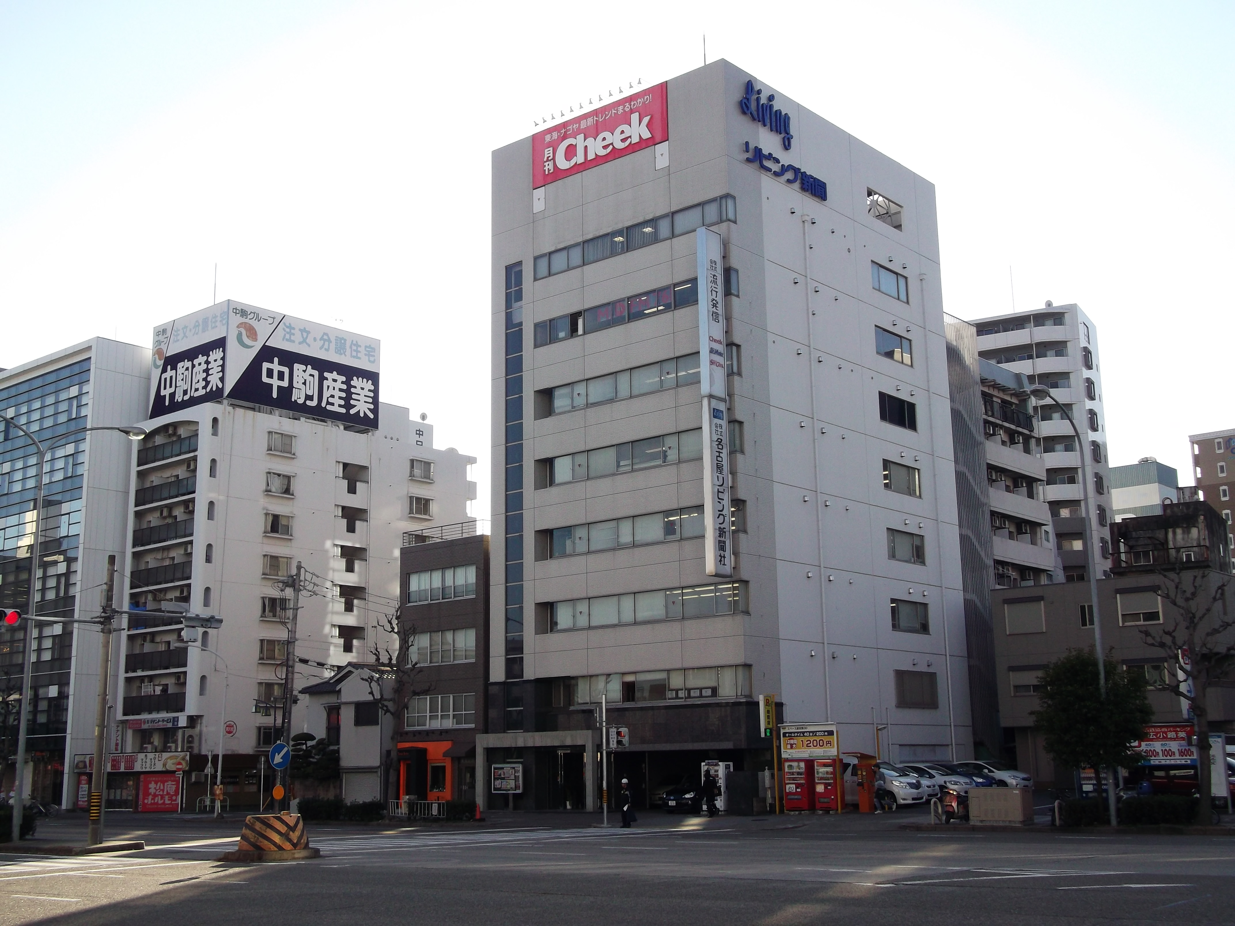 名古屋市中区の名古屋流行発信本社を東側公道北側より撮影